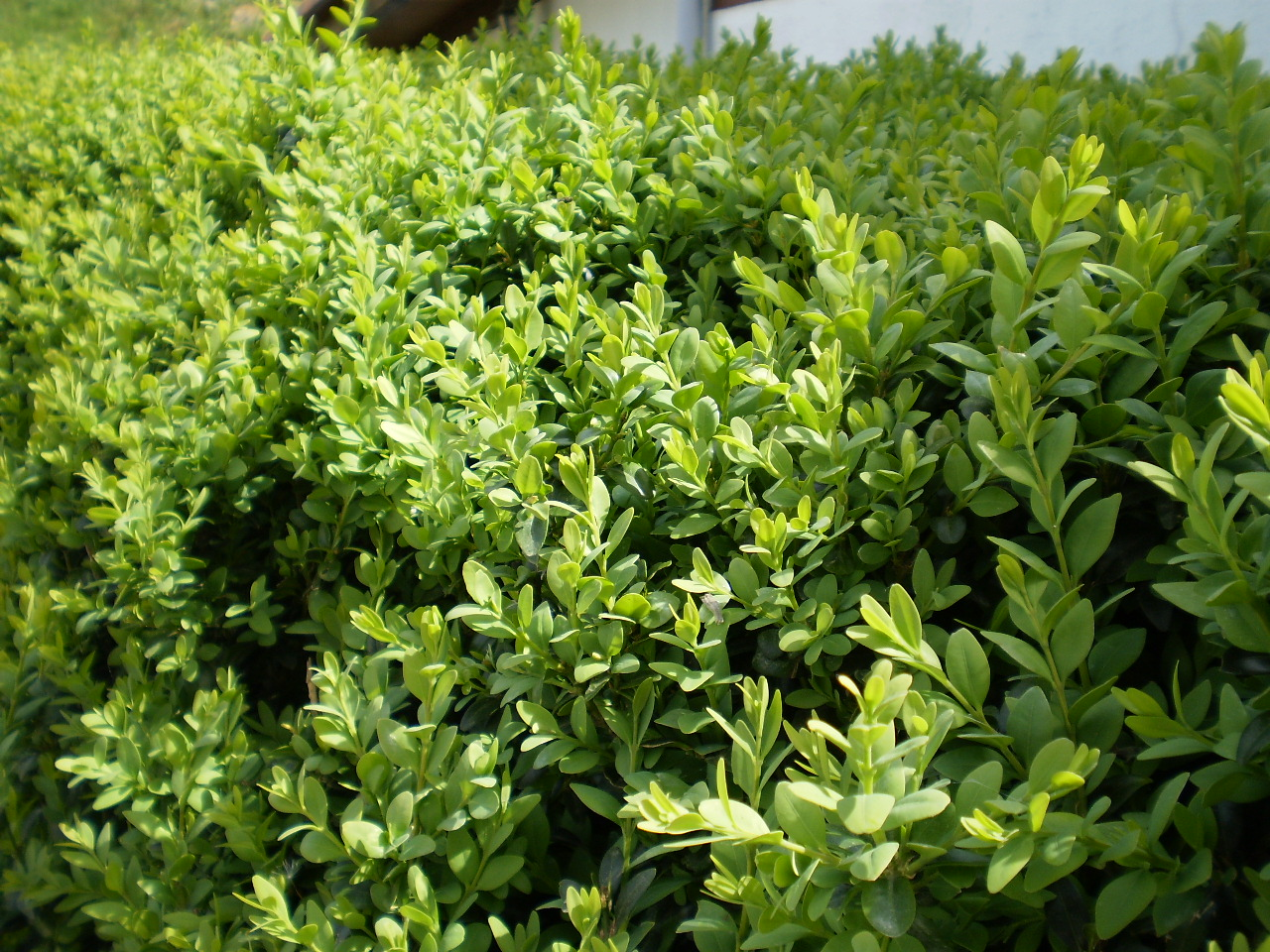 Pormenor de un seto de Buxus sempervirens con abundantes hojas nuevas